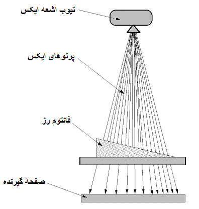 طریقه ی آزمایش فانتوم رز برای آزمودن معیار رز